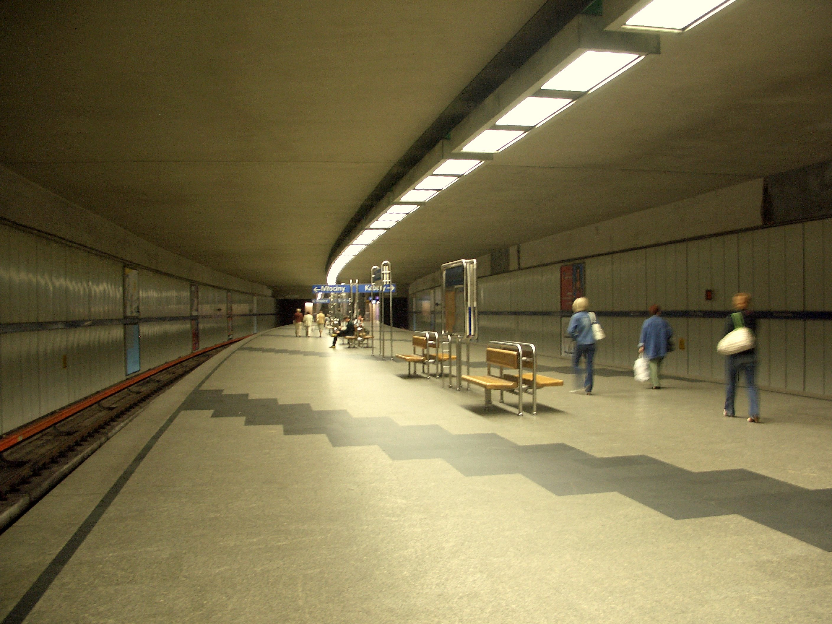 Warsaw metro station - A-11 Politechnika.